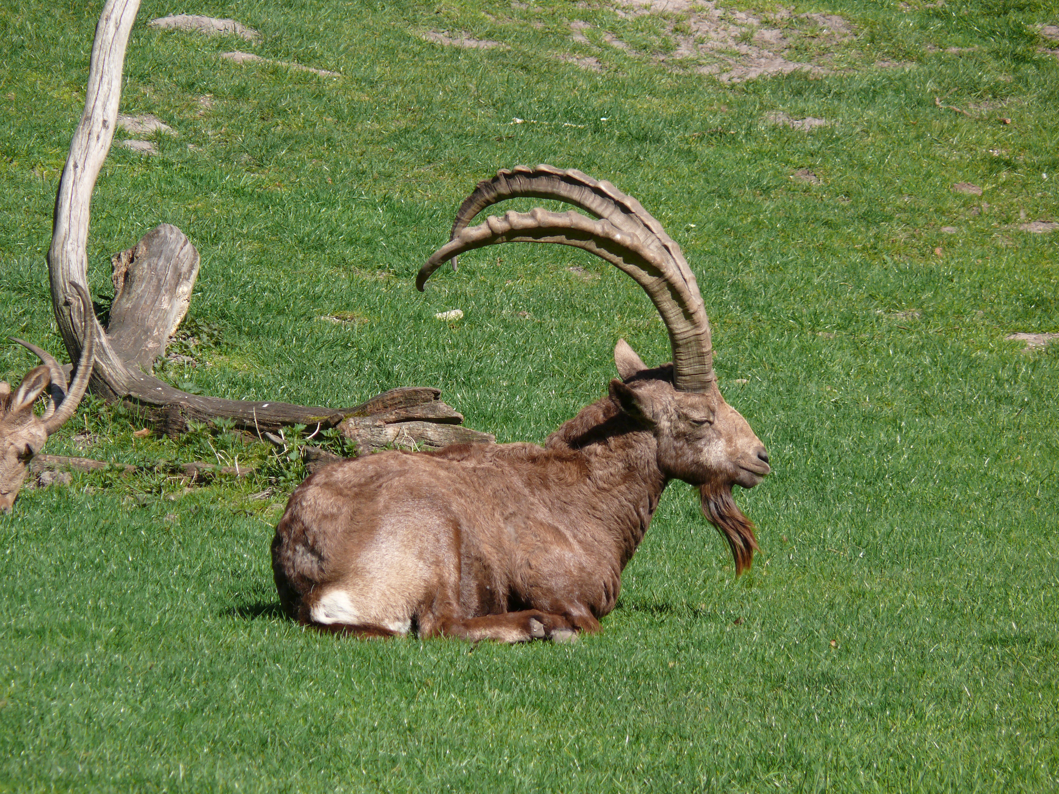 Sibirischer Steinbock (Capra ibex sibirica)